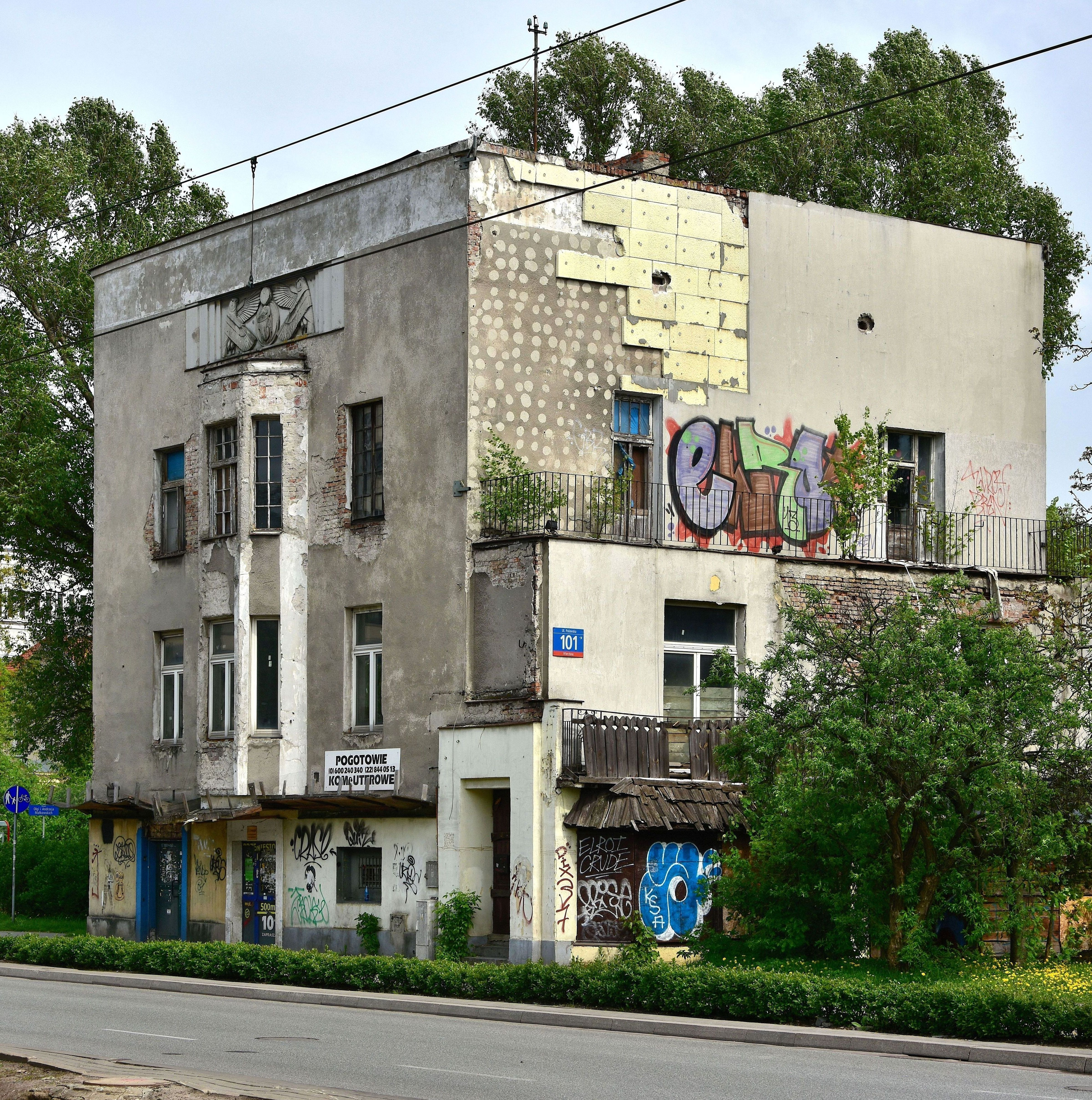 Dom pod Skarabeuszami przy ul. Puławskiej 101 w Warszawie